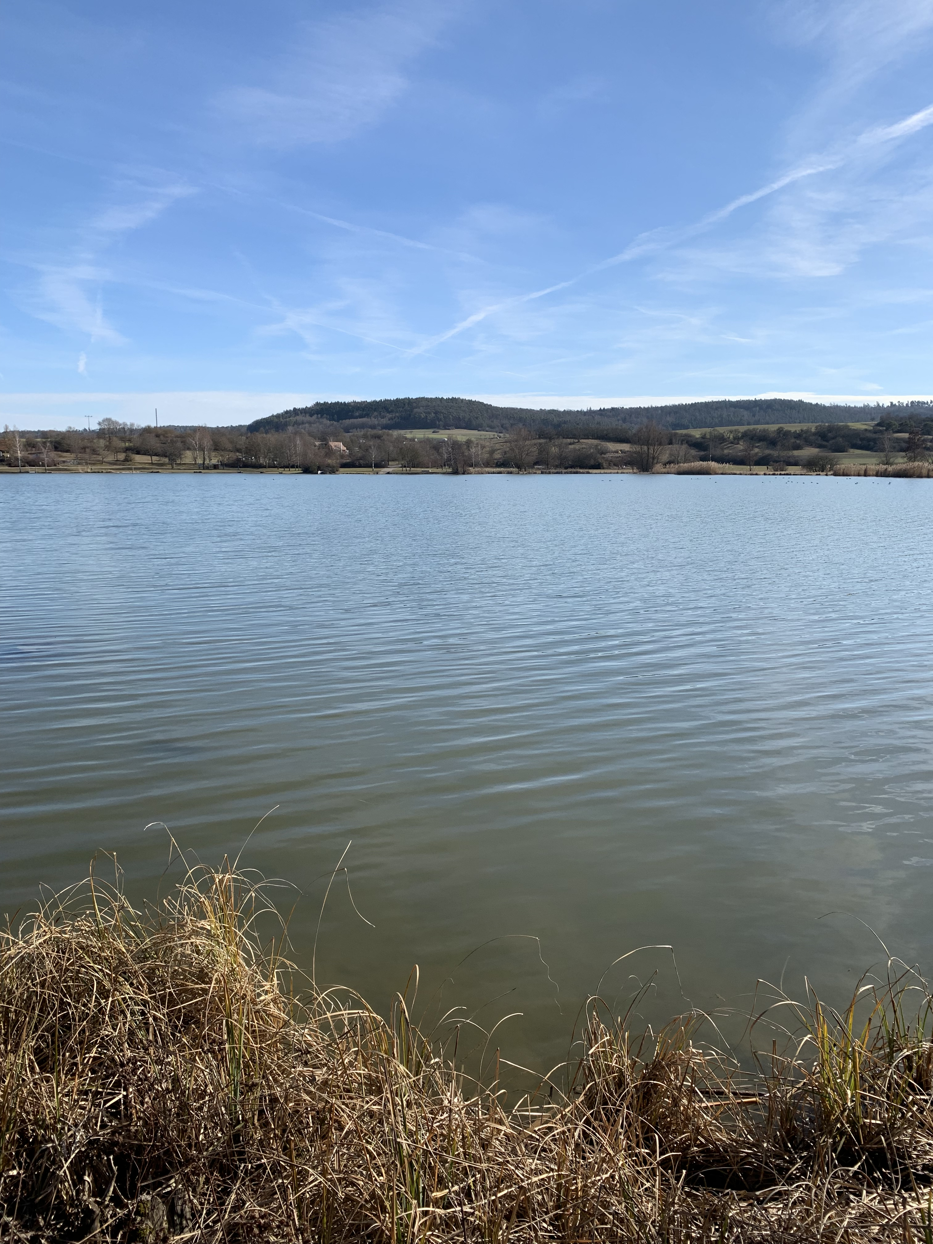 Das Bild zeigt den Obernzenner See. Auf dem gegenüberliegenden Ufer befindet sich das Badegelände.